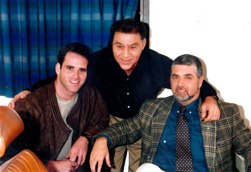 אלי פפושדו עם שמעון שבס ובוני גינסבורג